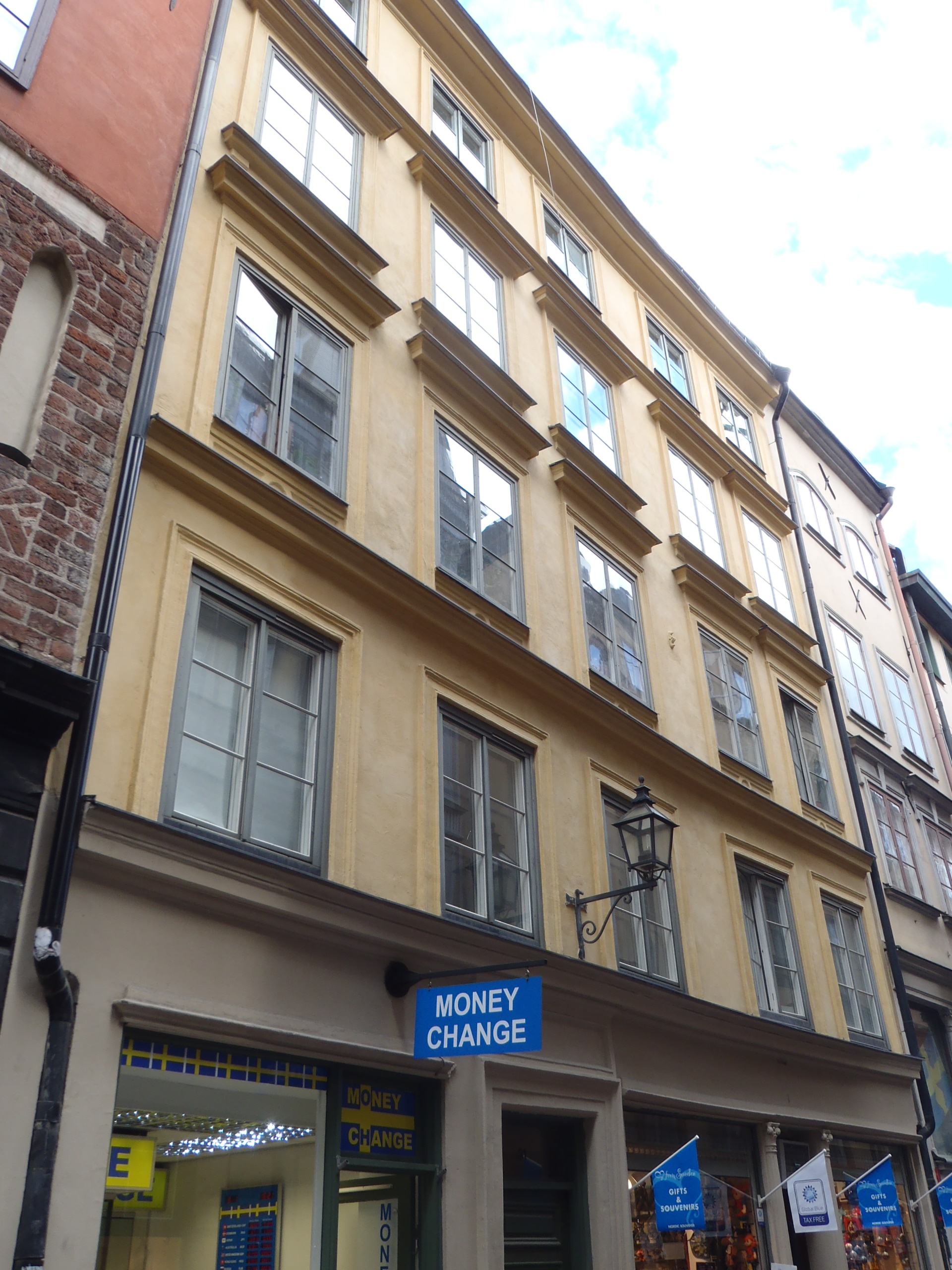 Bygningen nummer 31 på Västerlånggatan, Gamla Stan, Stockholm, der knytter sig til flere svenske politikere.